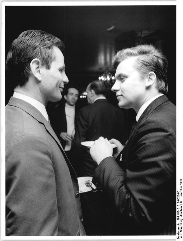 Zentralbild Spremberg 19.12.68 Berlin: Preisträger im Kinder- und Jugendbuch-Wettbewerb ausgezeichnet Hans Weber (rechts) und Dieter Schubert erhielten neben 21 anderen Schriftstellern und Illustratoren Auszeichnungen beim 17. Preisausschreiben des Ministeriums für Kultur zur Förderung der sozialistischen Kinder- und Jugendliteratur. Die Preise wurden am 19.12.68 auf einer Feierstunde Iim Hause der Deutschen Staatsoper vergeben. Weber erhielt den höchstdotierten Preis für sein Buch "Sprung ins Riesenrad" und Schubert wurde eine lobende Anerkennung für den Roman "Acht Unzen Träume" ausgesprochen, für den er bereits den Hans-Marchwitza-Preis erhalten hat.